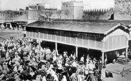 The modern Souk El Hboub in Sfax